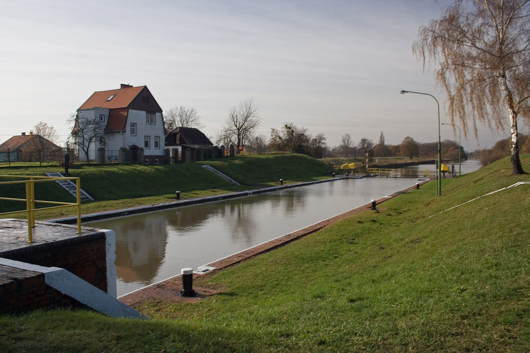 Komora Śluzy Opatowice